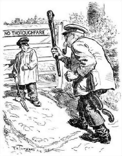 קריקטורה המציגה את בלגיה במלחמת העולם הראשונה. בלגיה כשומרת הדרך לצרפת: נער חלש אך אמיץ הניצב בעוז מול הבריון הגרמני. קריקטורה בפאנץ' הלונדוני, 1914